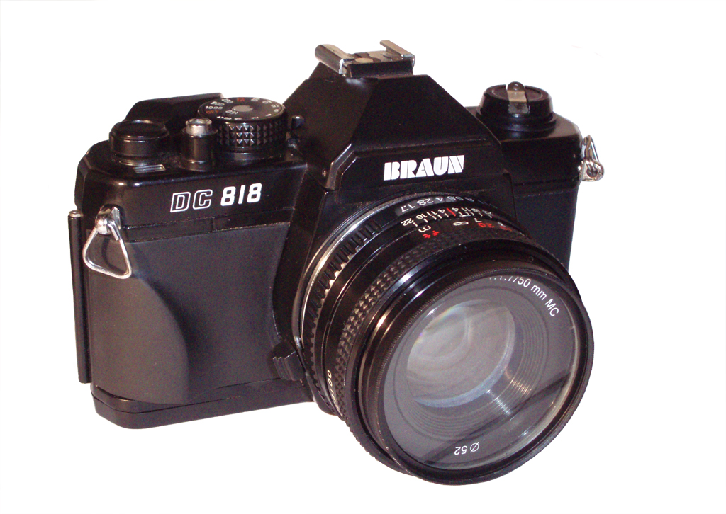 Velocidad de Obturación: B,1-1000 Diafragma: 1,7-22 Lente: normal (50 mm) montura tipo K, diámetro montura para lentillas 52 mm. Año de fabricación: 1960/65 aprox.